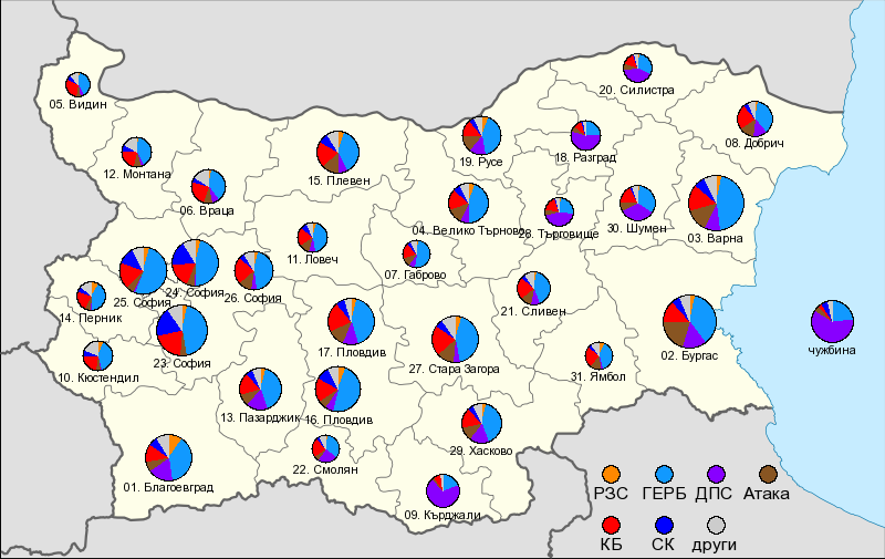 Парламентарни избори в България през 2009: подадени гласове по район